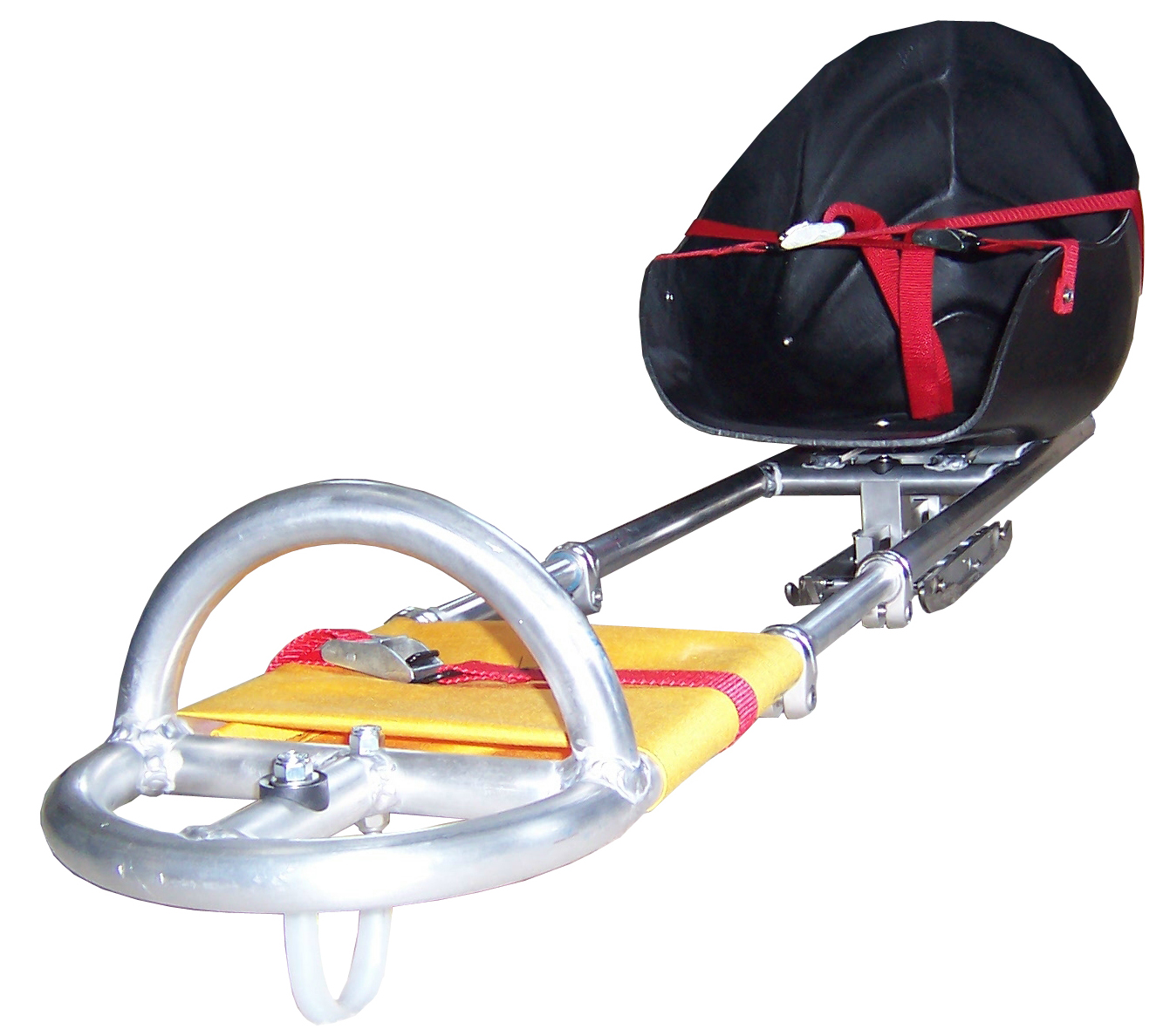 Randal J. Kwapis